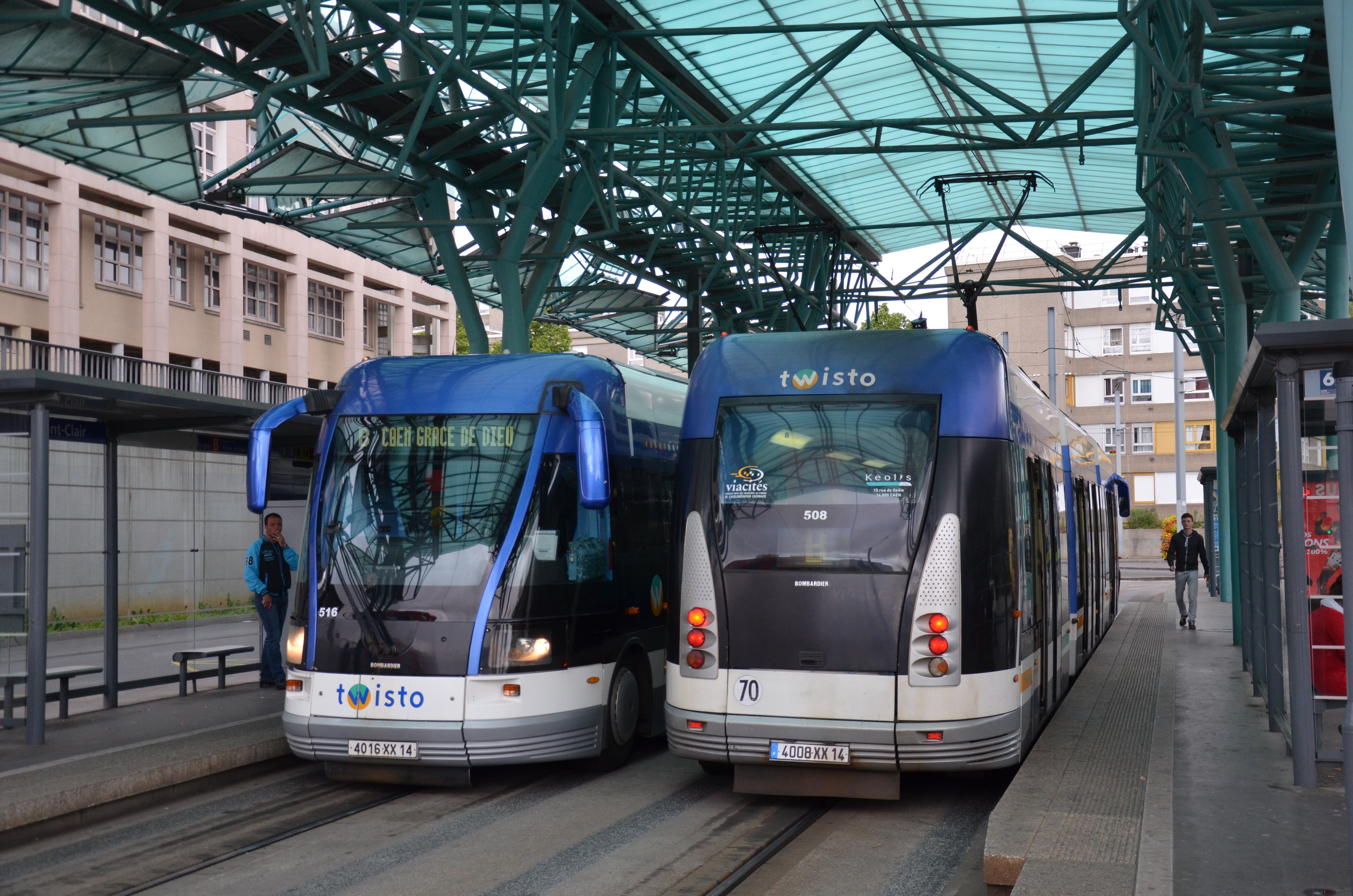 Bombardier TVR n°516 et 508 sur la ligne B du réseau Twisto de Caen, au terminus Hérouville Saint-Clair.